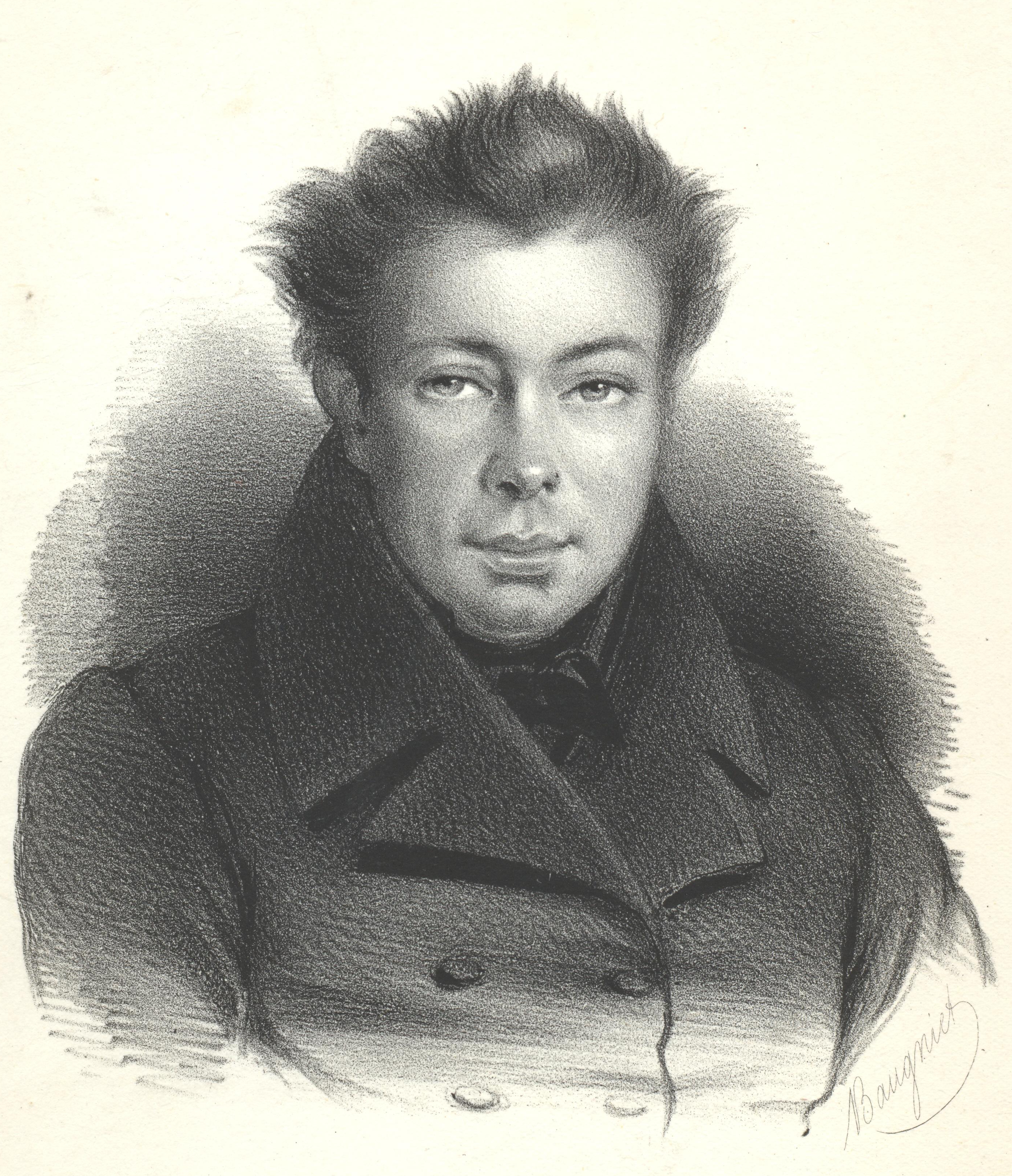 Werner de Mérode, homme politique belge et français